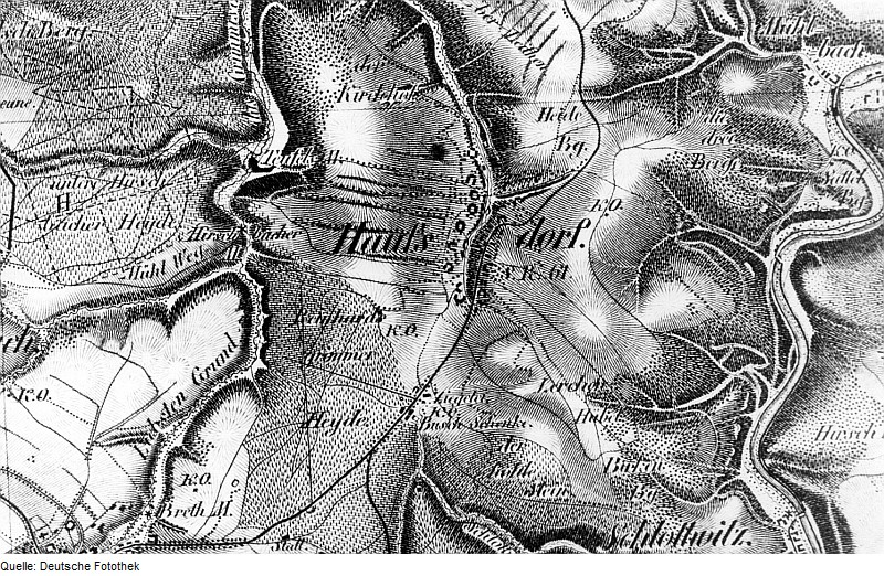 Original image description from the Deutsche Fotothek Hausdorf (bei Glashütte). Oberreit, Sect. Dresden, 1821/22